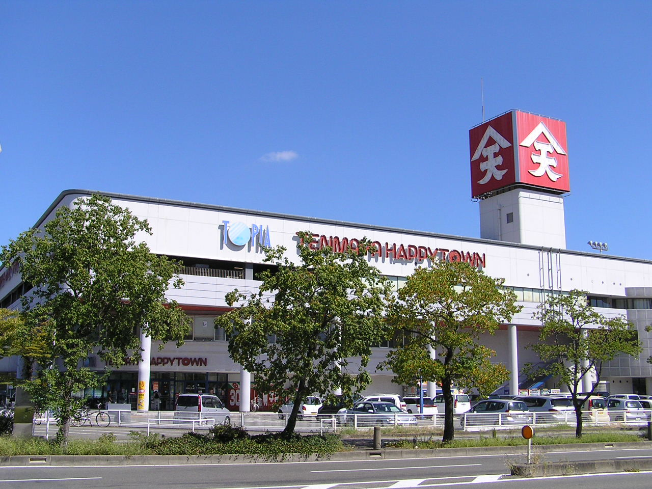 TenmayaHappyTown Kojima shop